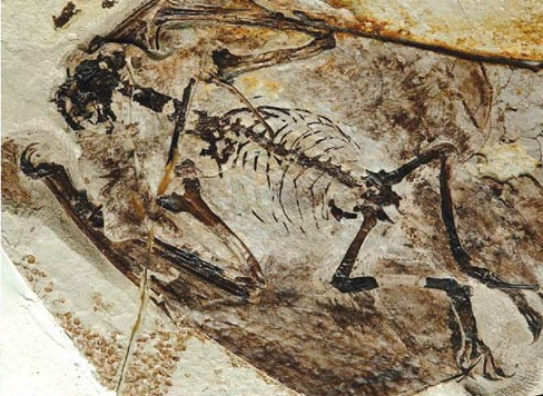 Jeholopterus fossil